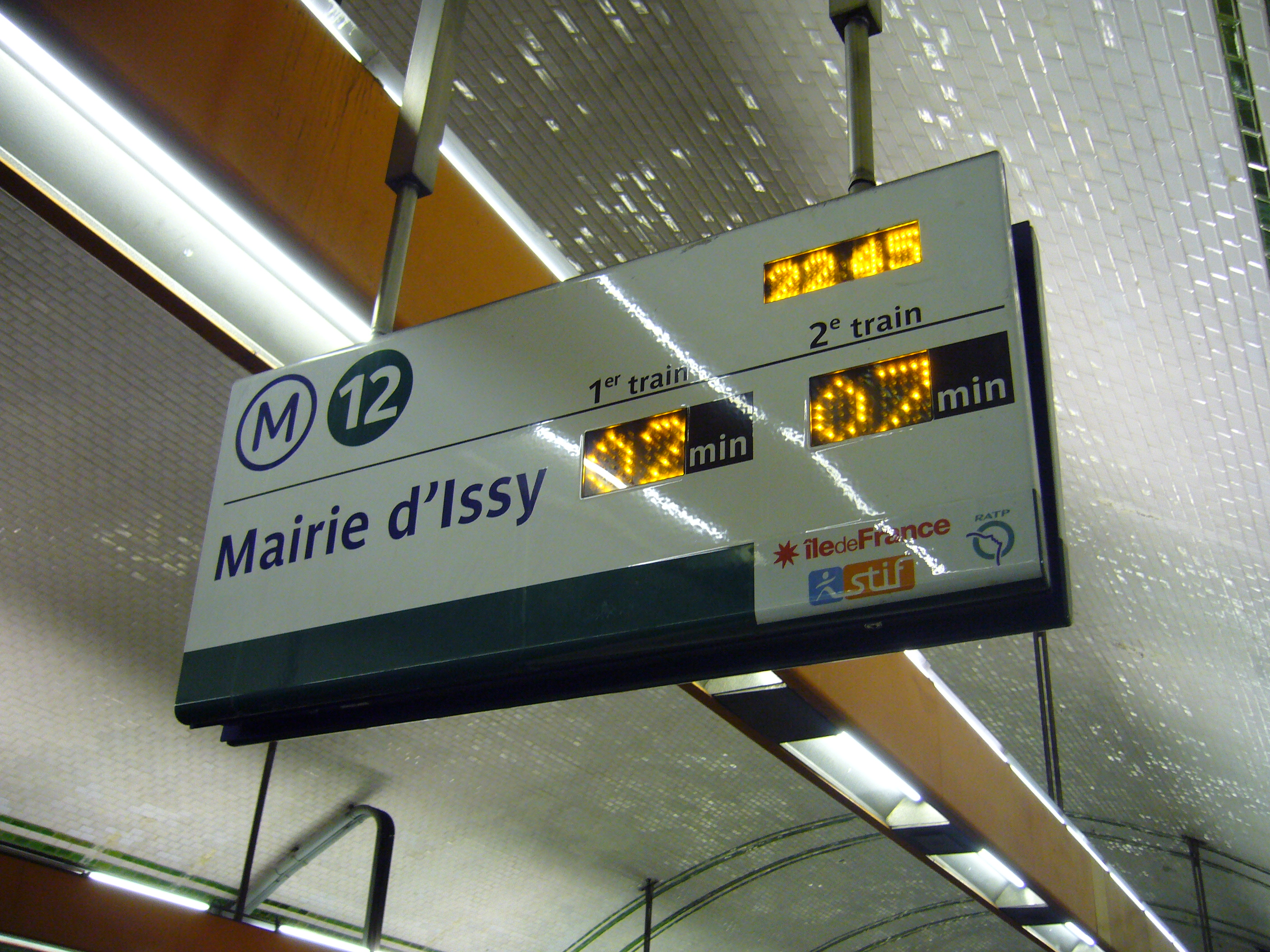 Vue du panneau SIEL de la station Pasteur de la ligne 12 du métro de Paris.